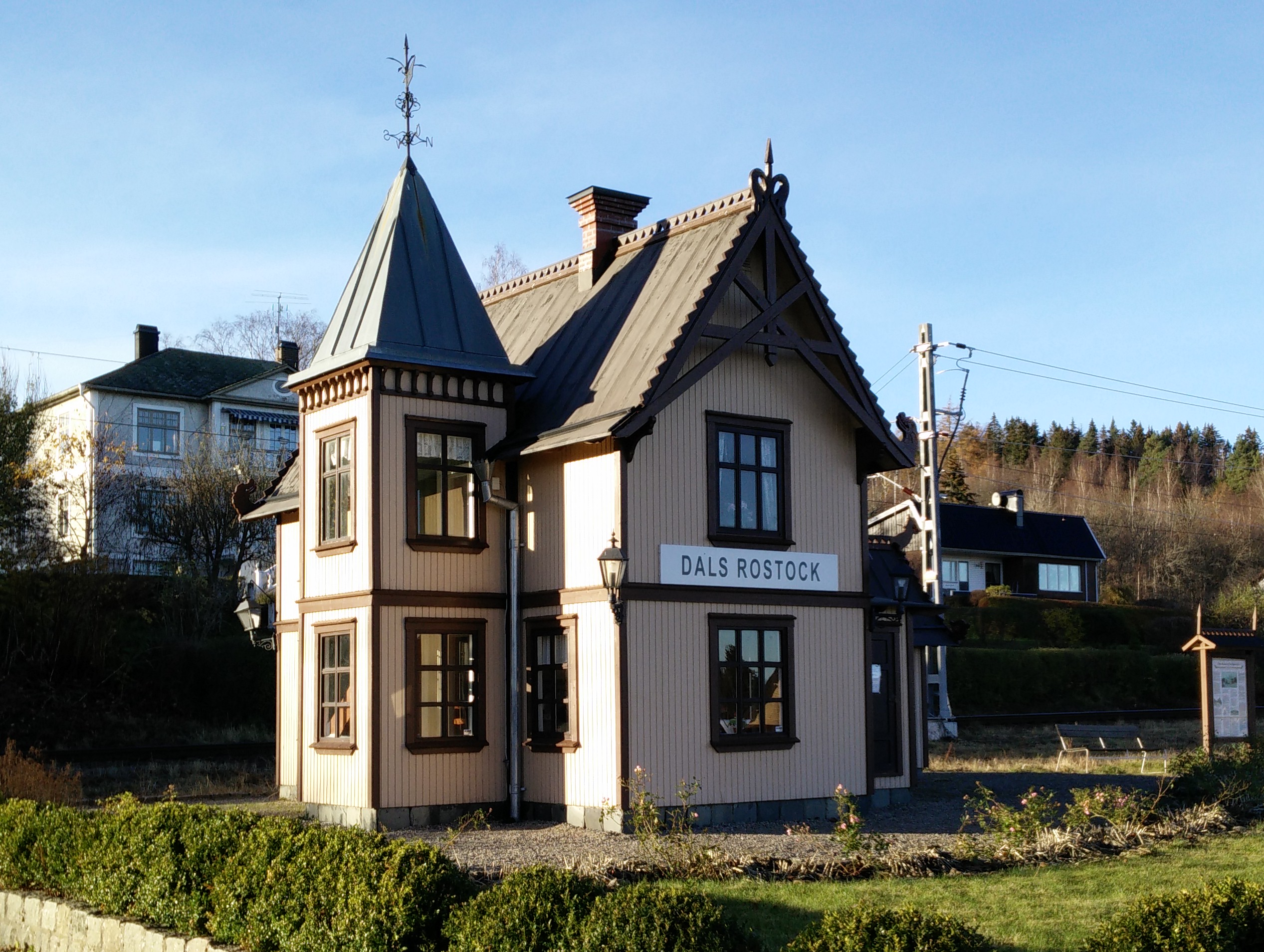 Stationsbyggnaden i Dals Rostock har byggts upp i halv skala.